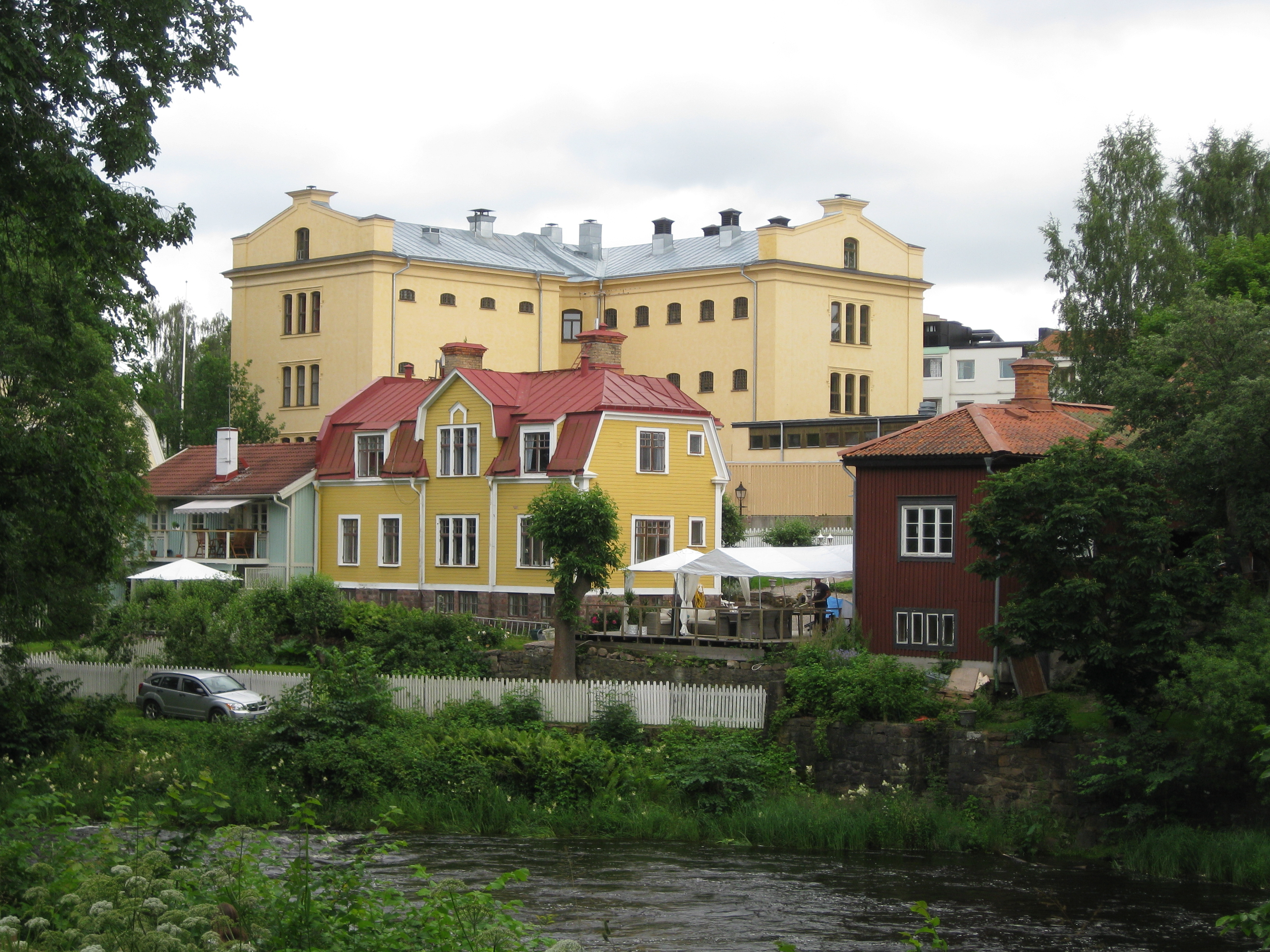 Det nedlagda fängelset i Gävle